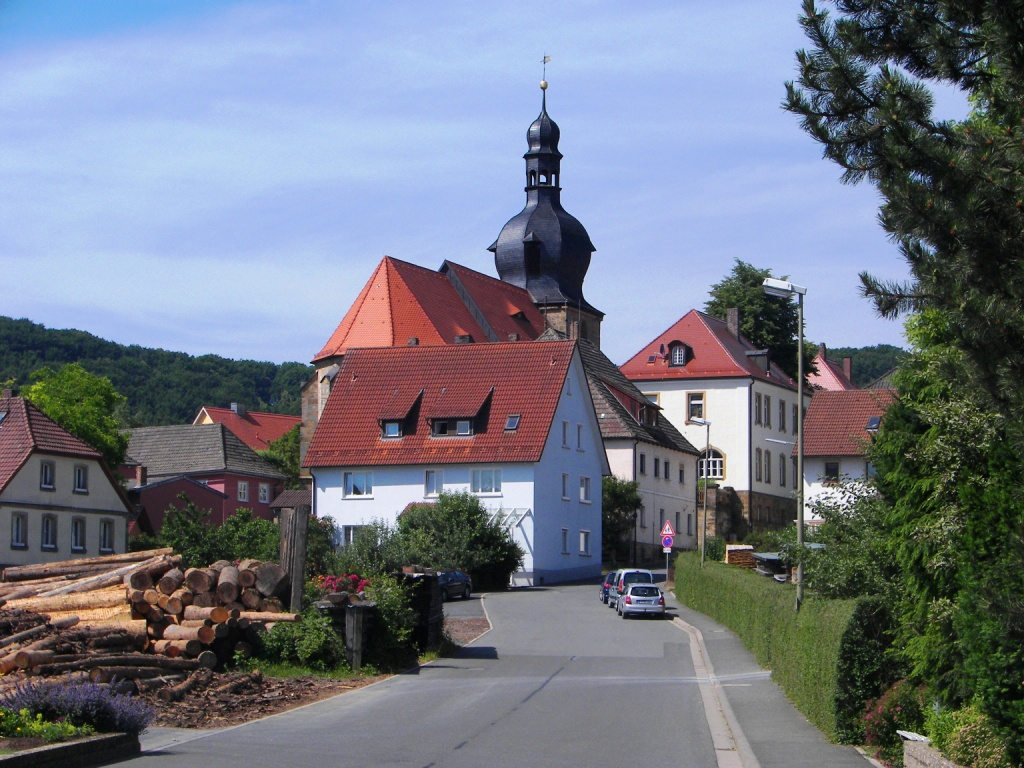 Kirche in Kasendorf